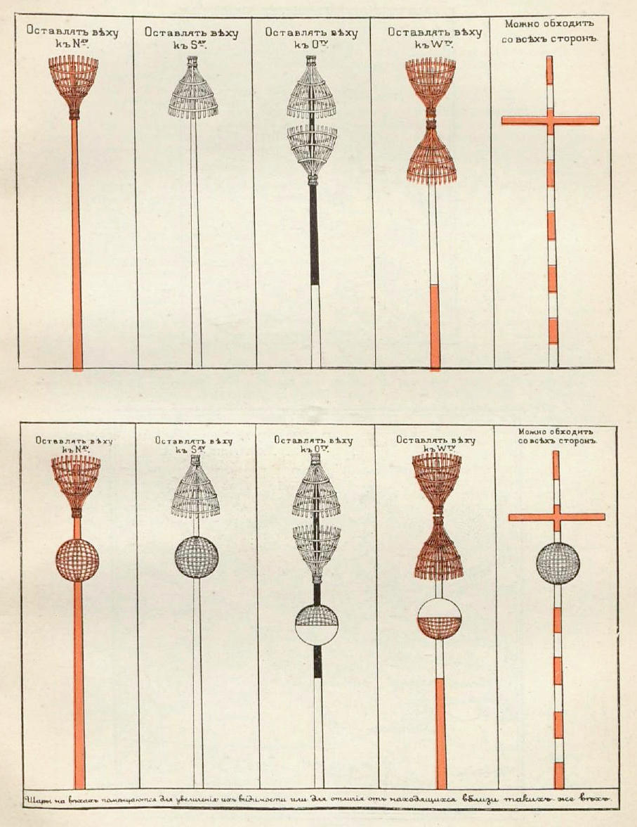 Данная картинка была использована в статье «Веха» опубликованной в шестом томе «Военной энциклопедии», который был издан книгоиздательским товариществом Ивана Дмитриевича Сытина в 1912 году в столице Российской империи городе Санкт-Петербурге. В Российской империи была принята следующая система постановки В.: 1) для ограждения опасностй с с. и, след-но, по южн. сторону фарв-ра ставится веха с черным голиком, раструбом вниз на бел. шесте; 2) то же с ю. (на севарной стороне фарватера) — Веха с красн. голиком, раструбом вверх, на красном шесте; 3) то же с в. (по зап. сторону фарв-ра) — Веха с двумя красн. голиками, раструбами врозь, на шесте, верхн. часть к-раго белая, а нижняя — красная; 4) то же с з. (по вост. штор. фарв-ра) — Веха с двумя черными голиками, раструбами вместе, на шесте, верх. часть к-раго черная, а нижняя — белая; и, наконец, 5) для ограждения опасности, которую можно обходить со всех сторон, ставятся крестовидные Вехи, состоящие из бело-красного (полосатого) шеста с красн. перекладиной. На некоторых В., для отличия их от соседних, а также для лучшей видимости, укрепляются один или несколько шаров; бывают также Веха с флагами. Системы ограждения опасностей в рус. морях даны в "Описаниях предостерегательных знаков" (издание главного гидрографического управления), а для иностр. морей — в соответствующих лоциях. В наших морях вехи устанавливаются весной, перед началом навигации, и убираются на зимнее время.